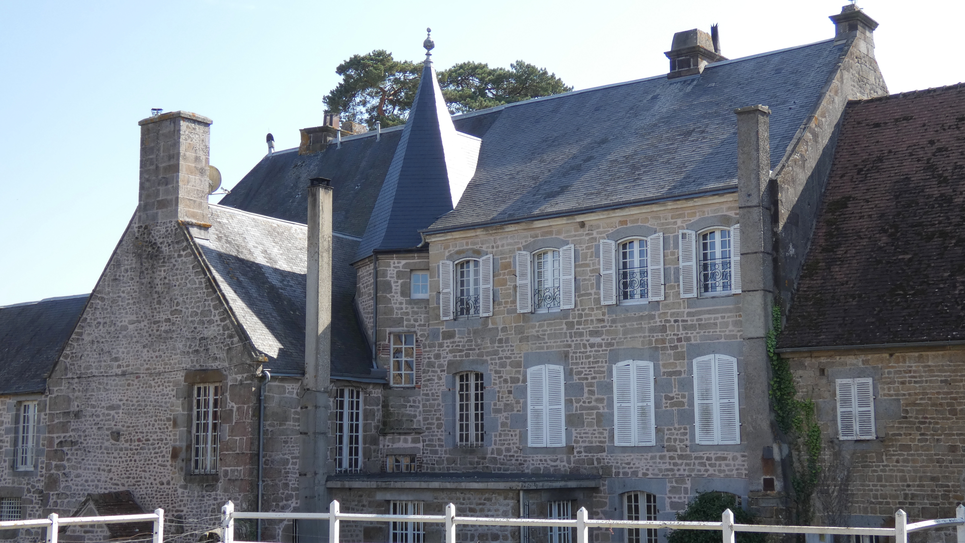 Le Champ-de-la-Pierre (Normandie, France). Le château.